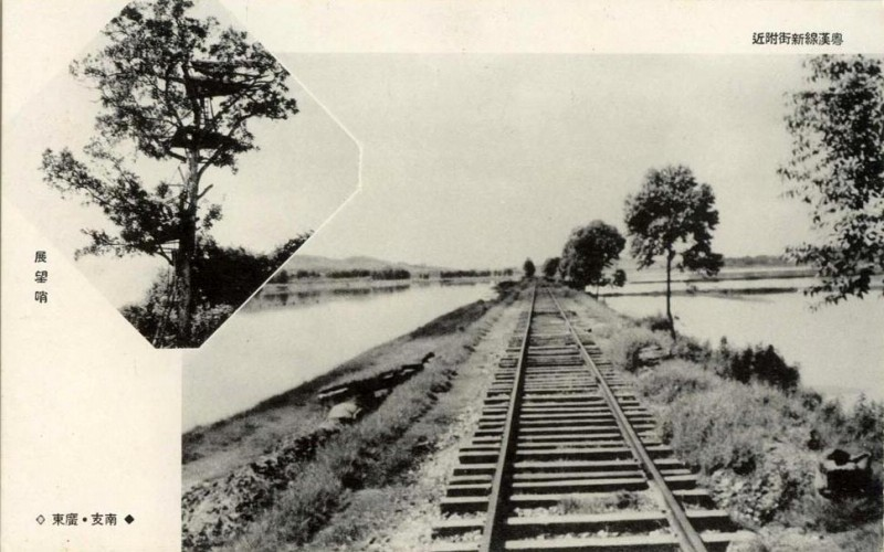 粵漢線新街附近，小圖是日軍崗哨。